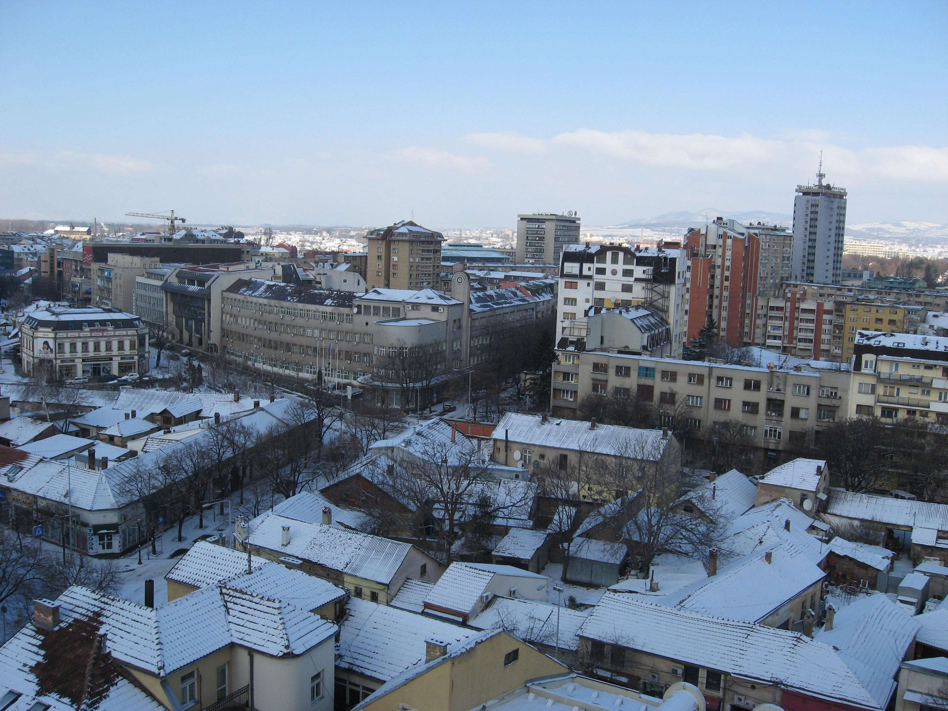 Winter in Niš